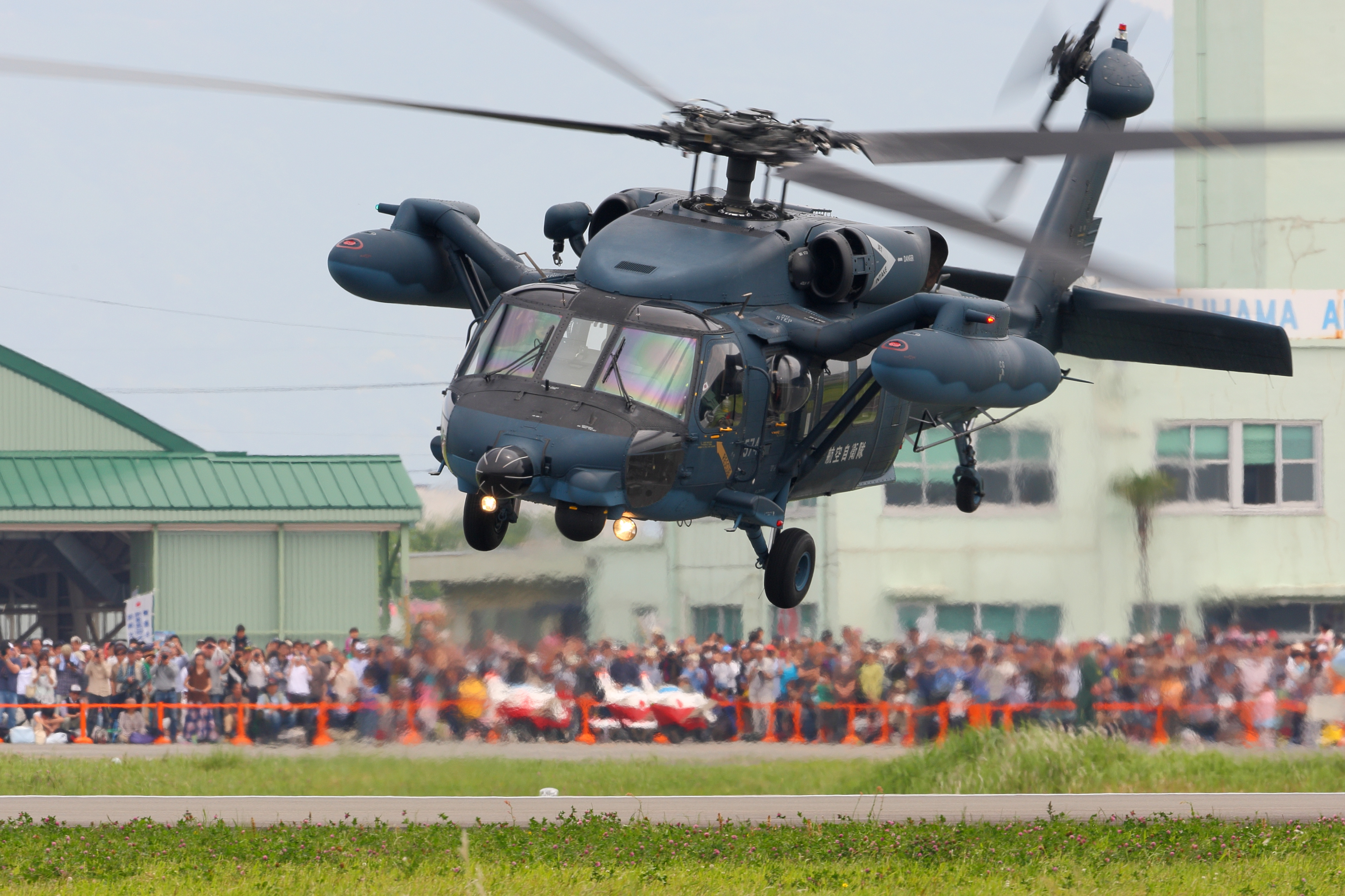 航空自衛隊静浜基地で展示飛行を行なう浜松救難隊のUH-60J